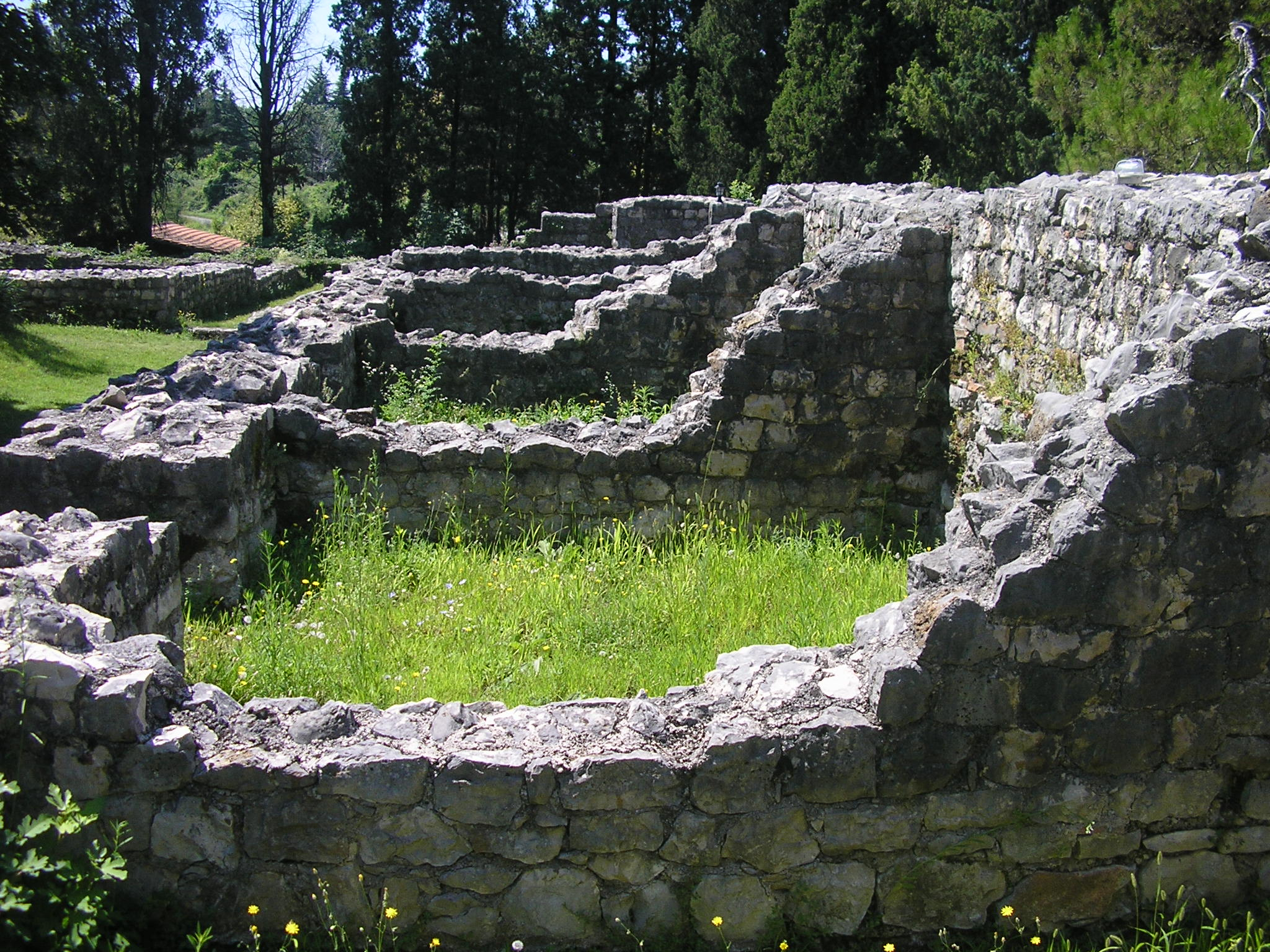 Detalj sa zapadnog zida